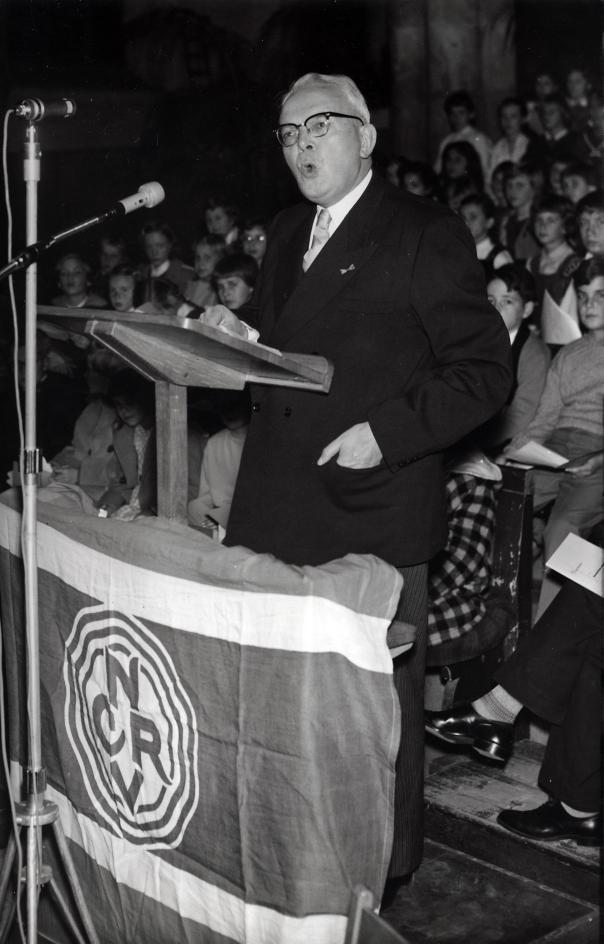 De heer A.B. Roosjen (ARP), voorzitter van de NCRV, spreekt tijdens het 35-jarig bestaan van deze omroep. Nederland, Utrecht, 16 november 1959.